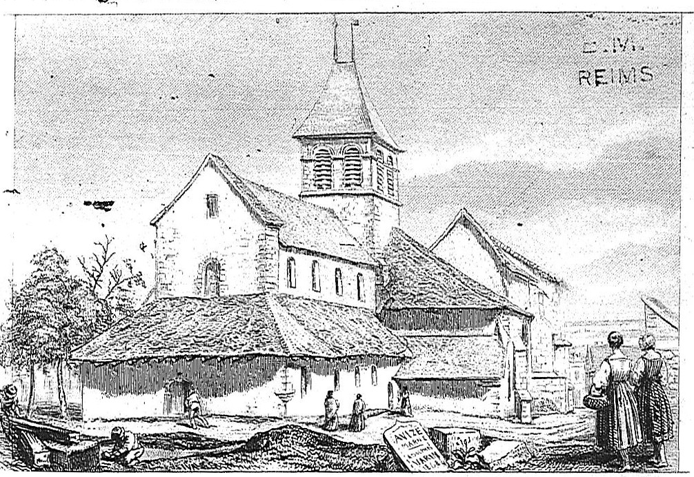 une vue de l'église.